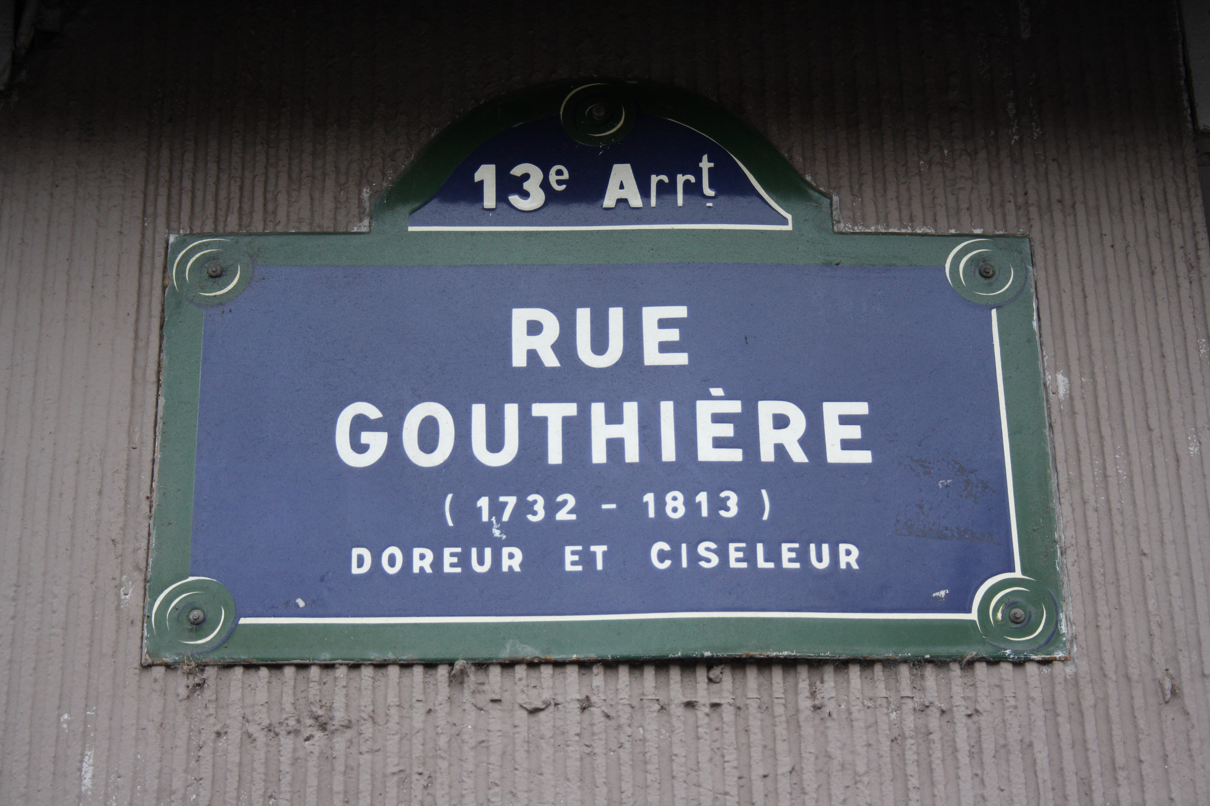 Straßenschild Rue Gouthière in Paris (13. Arrondissement)